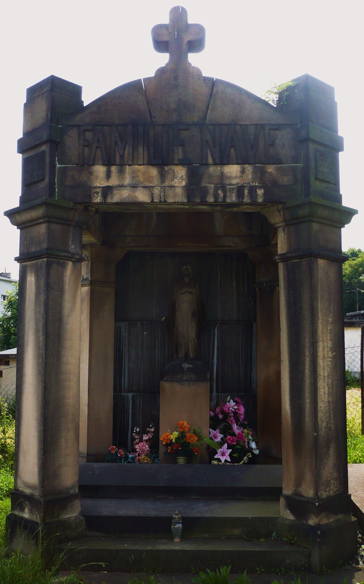 Nowa Ruda, ul. Cmentarna - cmentarz komunalny (grobowiec rodziny Nave)